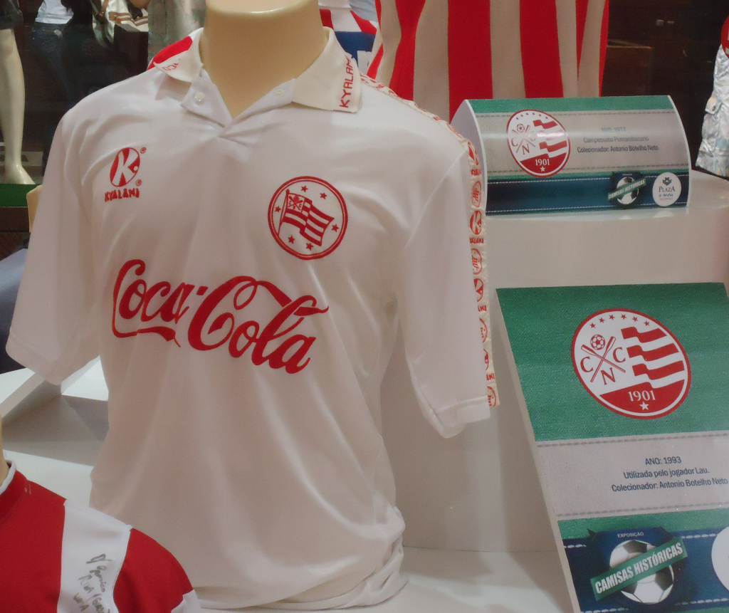 Camisa do Clube Náutico Capibaribe de 1993, utilizada pelo jogador Lau.